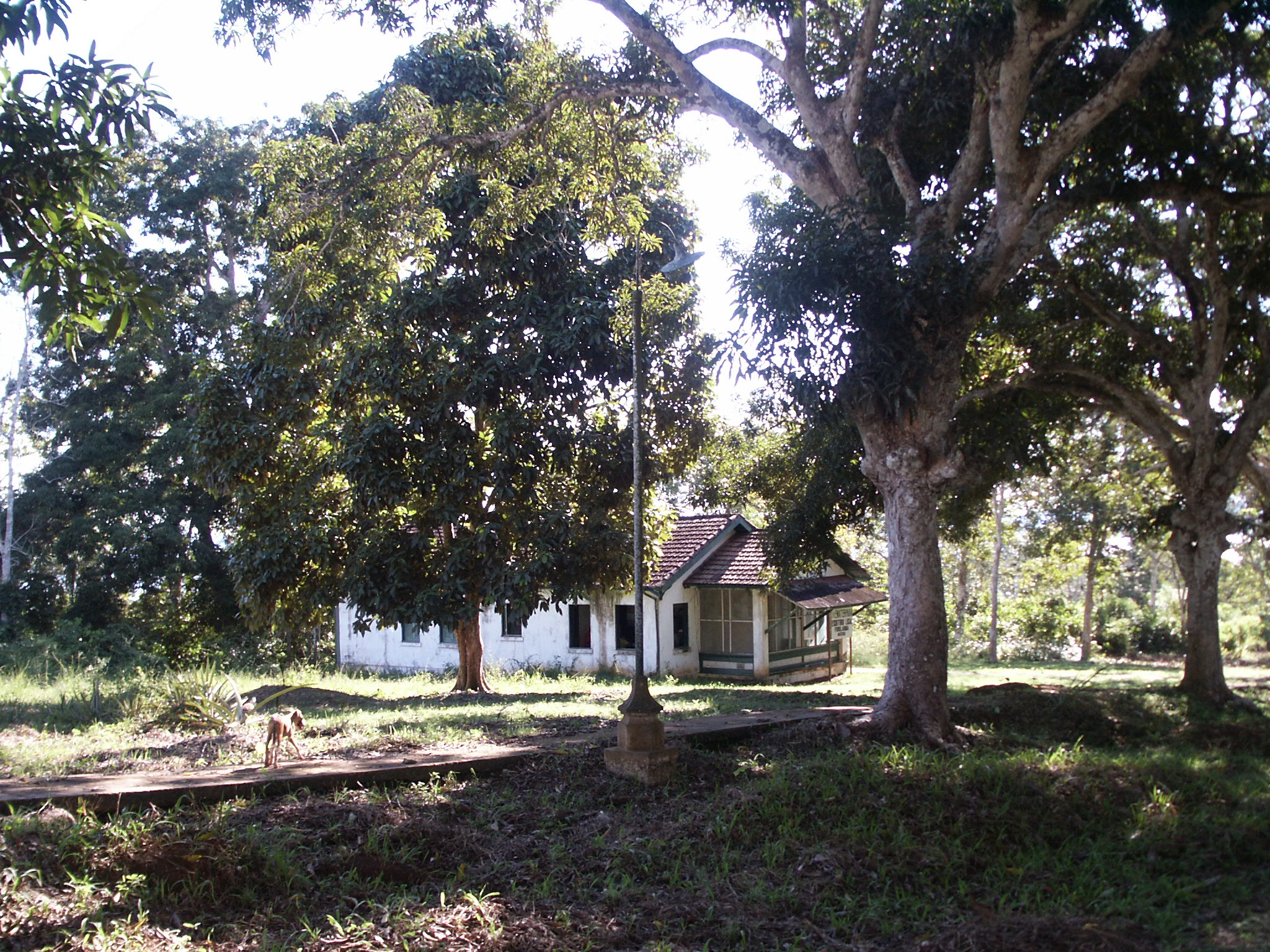 Vestiges de Fordlândia -Escritorio Local et allée de manguiers- août 2005